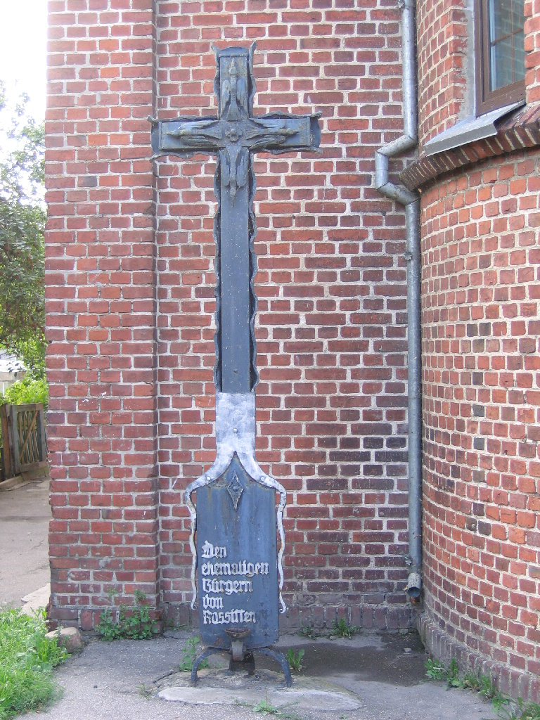 Rossitten, 24-Aug-2006